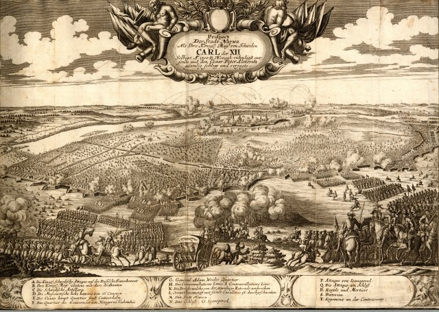 Scan from Johann Christoph Brotze's book Sammlung verschiedner Liefländischer Monumente. Prospect Der Stadt Narwa Als Ihro Königl. Maij.von Schweden Carl der XII Selbige Anno 1700 20-30 Novemb. ... [die Gravüre].